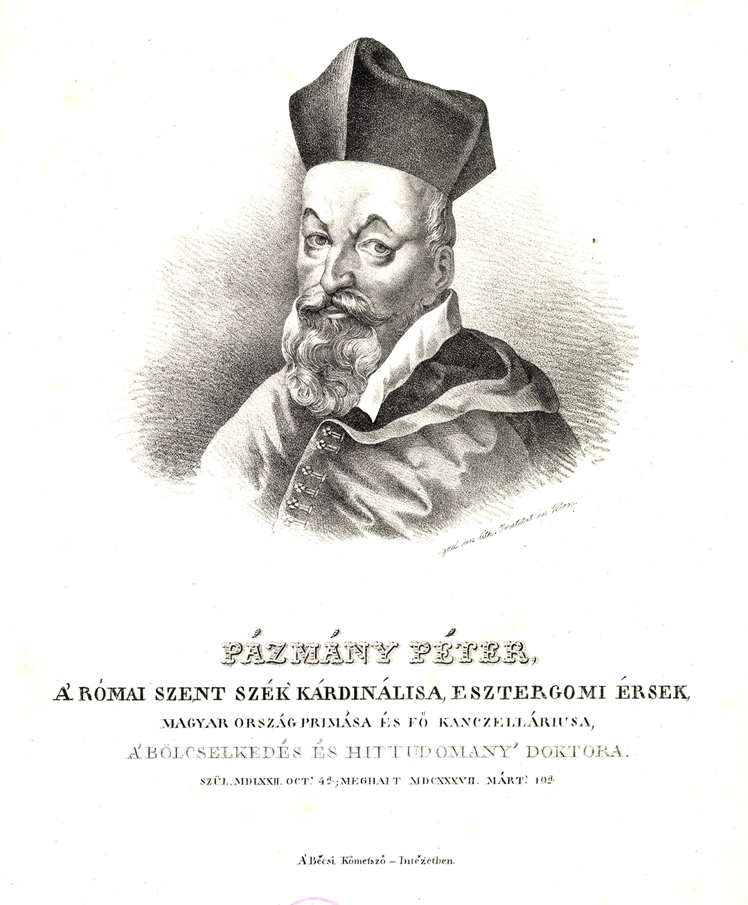 Hont-Pázmány nembeli panaszi Pázmány Péter (Nagyvárad, 1570. október 4. – Pozsony, 1637. március 19.) esztergomi érsek, bíboros, a magyarországi ellenreformáció vezető alakja, író.